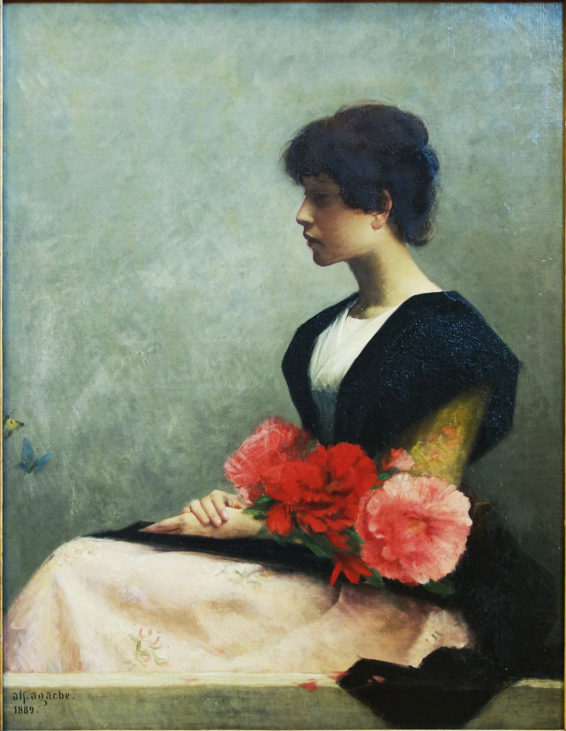 Jeune femme assise tenant des fleurs dans les brastitle QS:P1476,fr:"Jeune femme assise tenant des fleurs dans les bras" label QS:Lfr,"Jeune femme assise tenant des fleurs dans les bras"